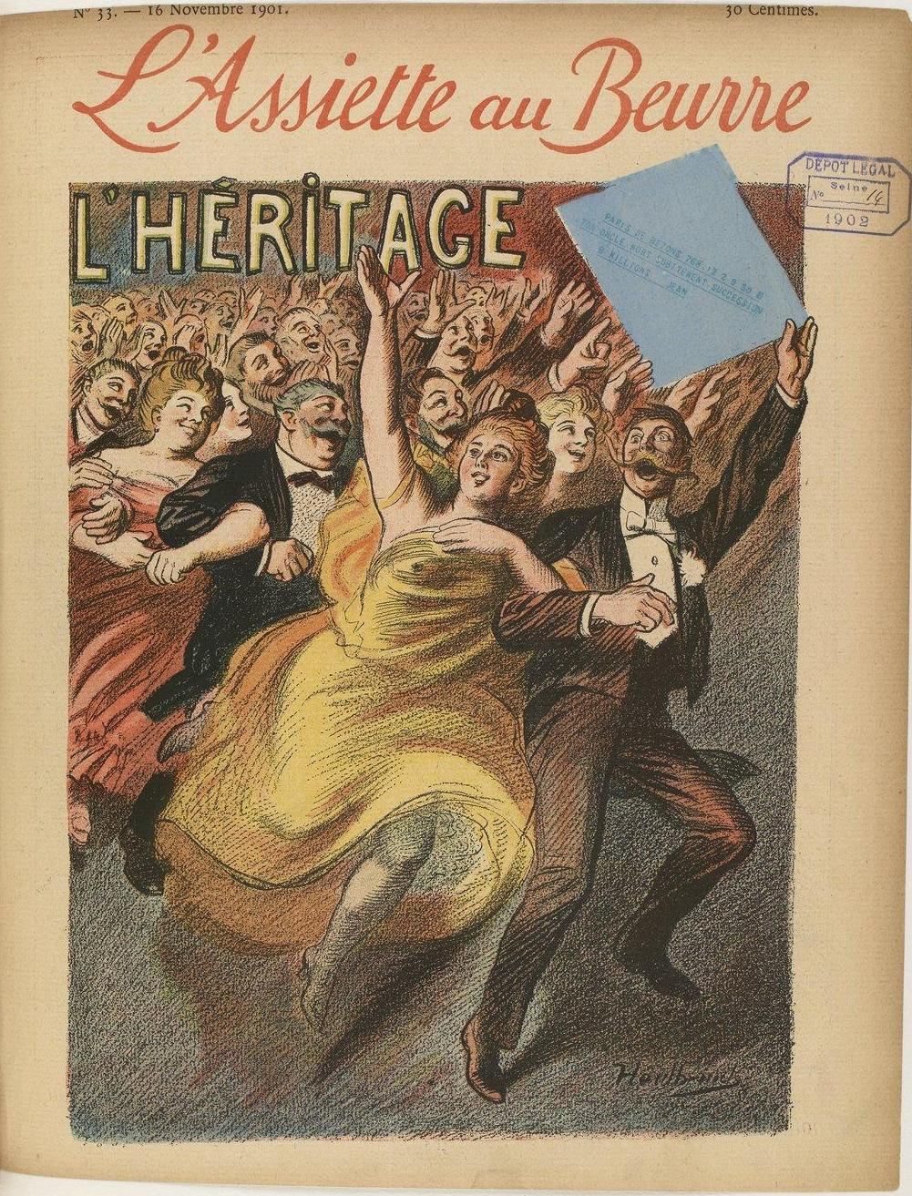 « L'Héritage » in L'Assiette au beurre n'°33 du 16 novembre 1901.